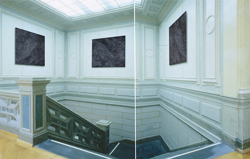 Hans Danuser: Installation „Frozen Embryo“. Bündner Kunstmuseum, 2000, Fotografie auf Barytpapier, 3-teilig, je 141 x 150 cm, installiert in der Villa Planta im Lichthof und Aufgang zur permanenten Sammlungsausttellung im 1. Stock